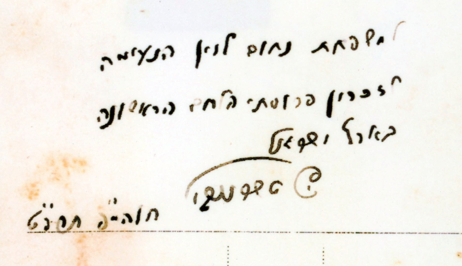 שמואל טשרנוביץ היה סופר, עיתונאי ופעיל ציבור. אביה של ימימה טשרנוביץ התמונה נמסרה לנחום הלוי-לוין מהמושבה כנרת בפסח של 1929 כאות תודה על כך שכאשר טשרנוביץ הגיע לארץ בשנת 1921, הוא נסע בעגלה לבית גן אך מכיון שהיה יום חורף ובוץ רב-לא יכלו להגיע לבית גן ועצרו בכנרת. הם דפקו בדלת של נחום לוין-הלוי ונשארו ללון עם שמואל הייתה אשתו, אמו ו 3 ילדי בפסח 1929 כשבאו לבקר בכנרת נתן שמואל טשרנוביץ למשפחת נחום הלוי-לוין את התמונה המצורפת עם ההקדשה לזכר פרוסת הלחם הראשונה בארץ ישראל-בהתייחסו ליום שהגיעו ב 1921